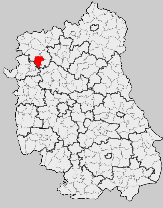 Map of gmina Adamów, Łuków county, Lublin voivodship Mapa gminy Adamów, powiat łukowski, województwo lubelskie